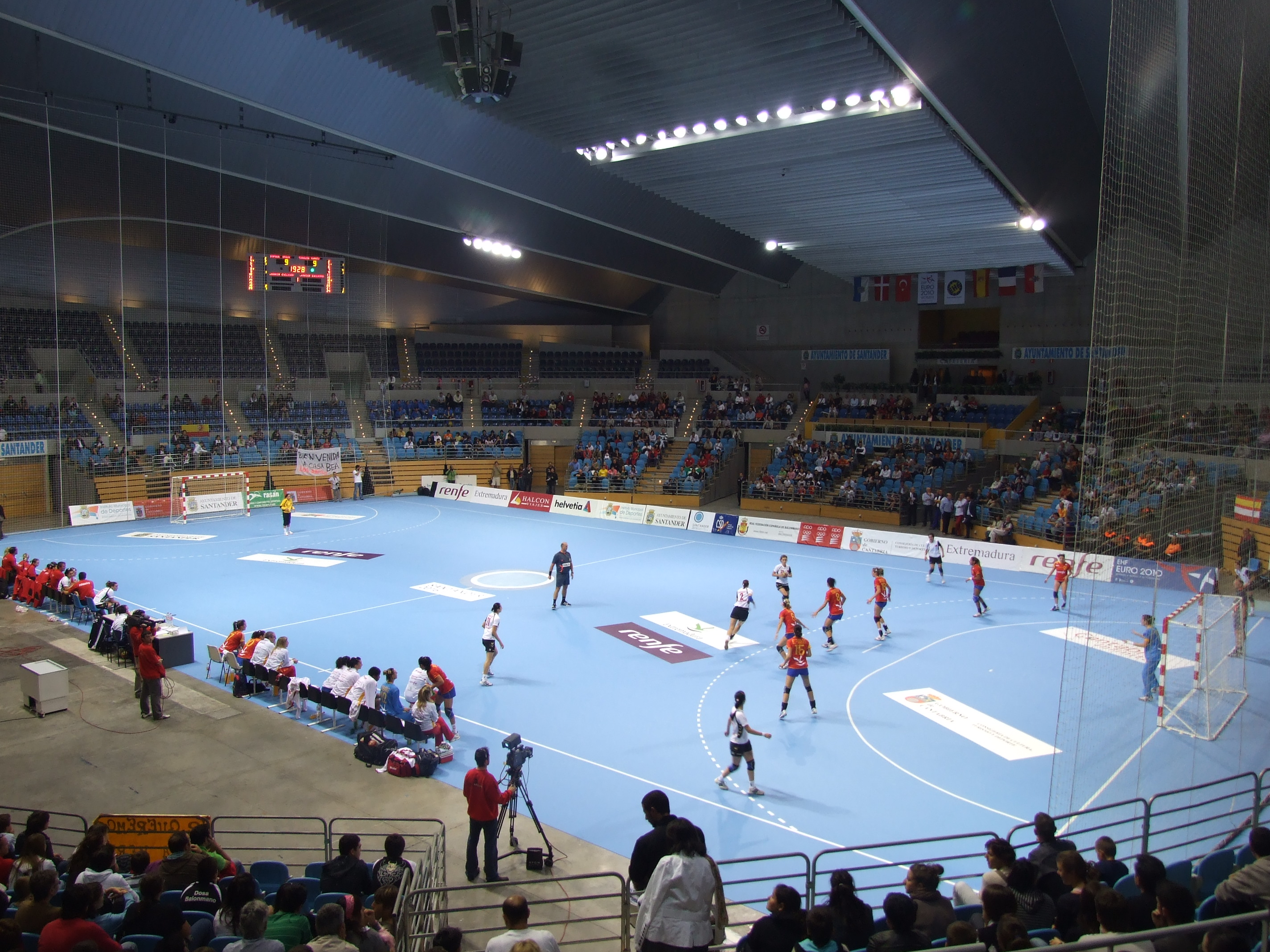 El 14 de octubre de 2009 la seleccion española de balonmano femenino disputó en Santander un partido ante Turquía clasificatorio para el Europeo.